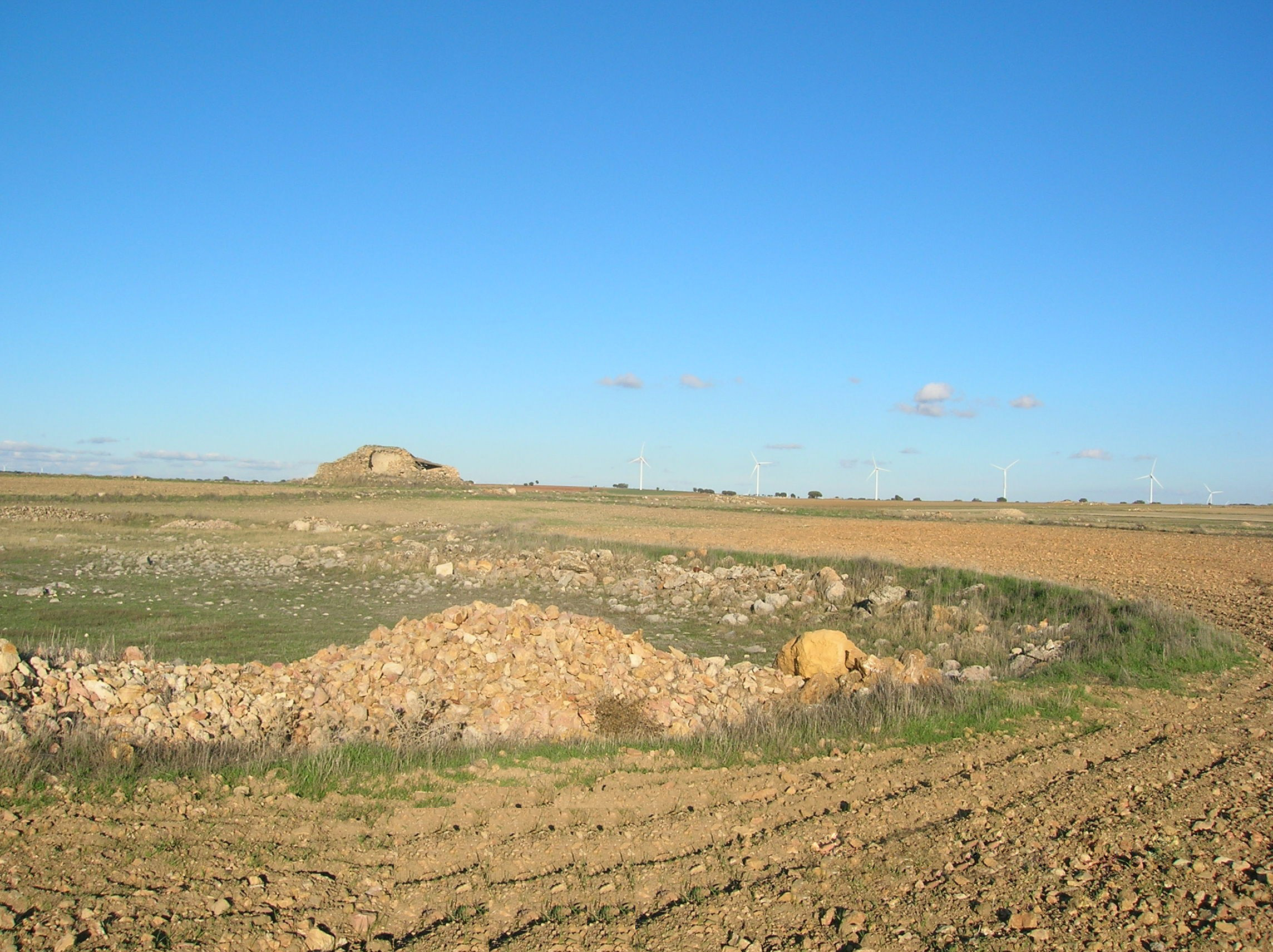 Navas de infiltración de aguas superficiales en zonas de llanura.